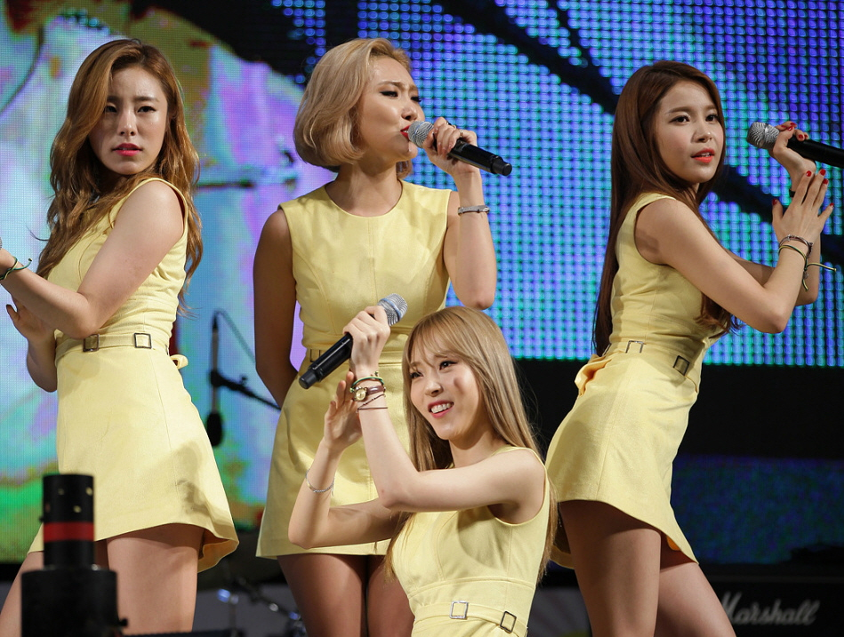 마마무(MAMAMOO) 이상미의뮤직닷컴 공개방송 화성시 우정읍